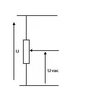 schematische weergave van een potentiometer